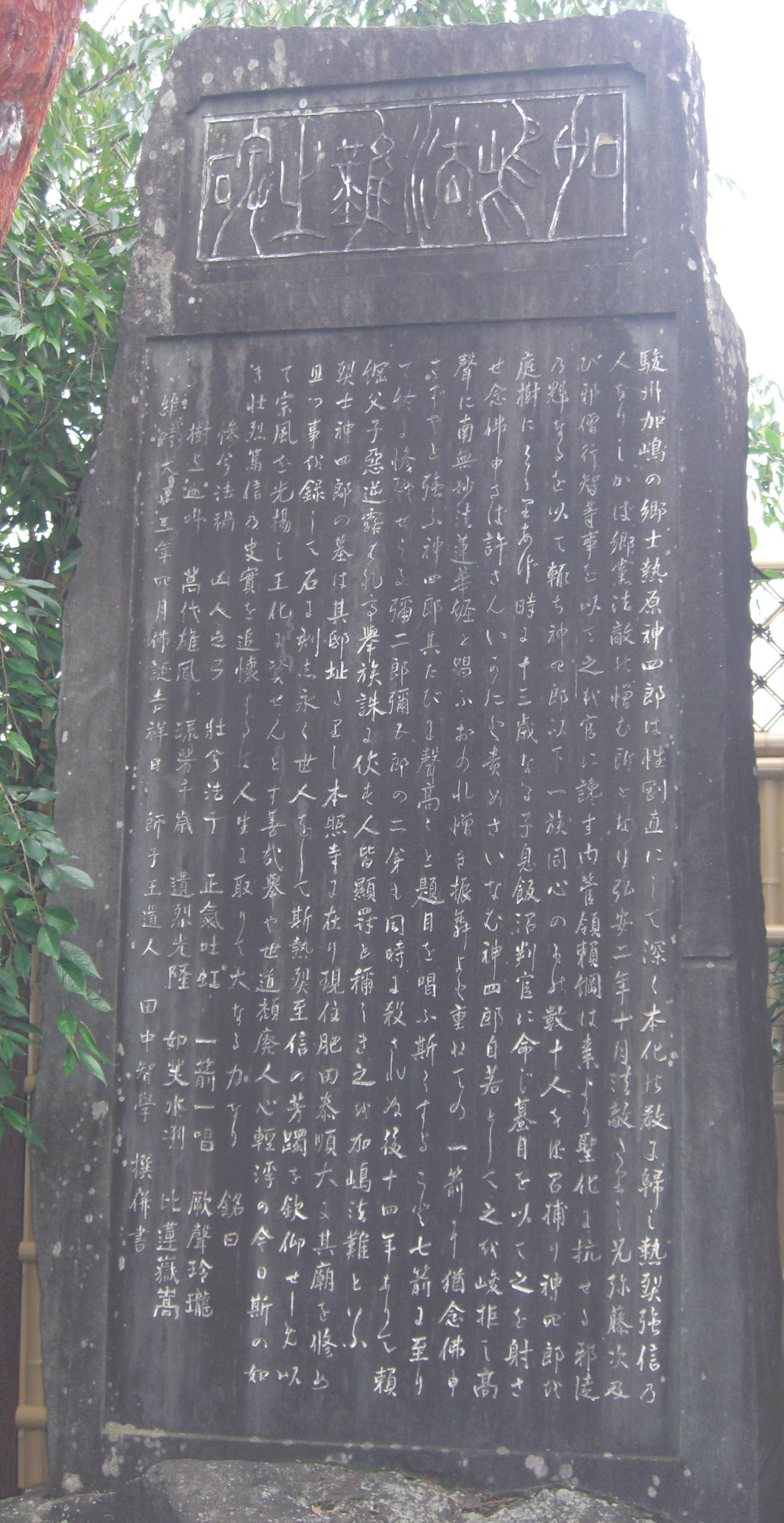 富士市厚原本照寺